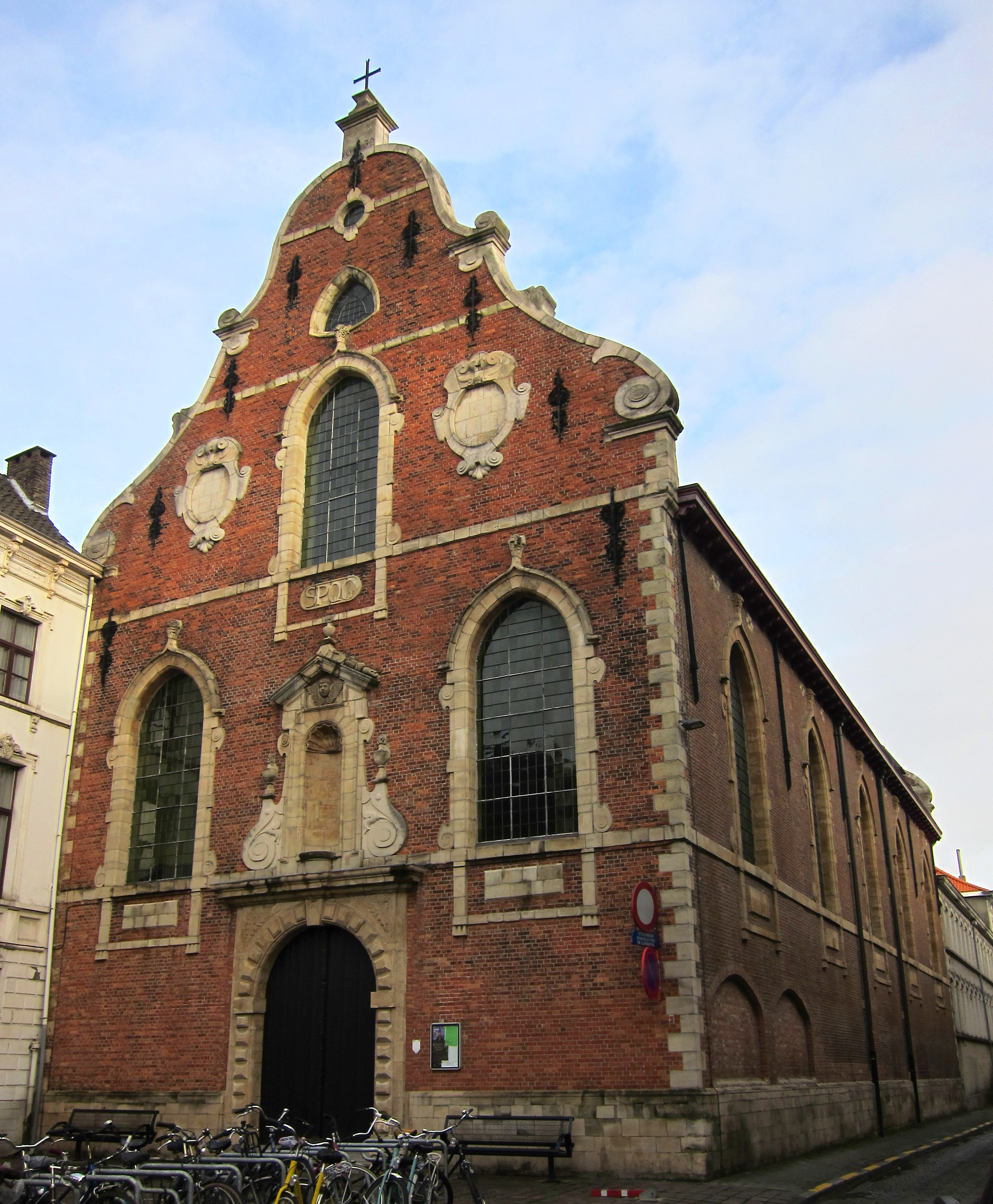 Gent Sint-Christoffelkapel (18925) 3-01-2014 12-32-52